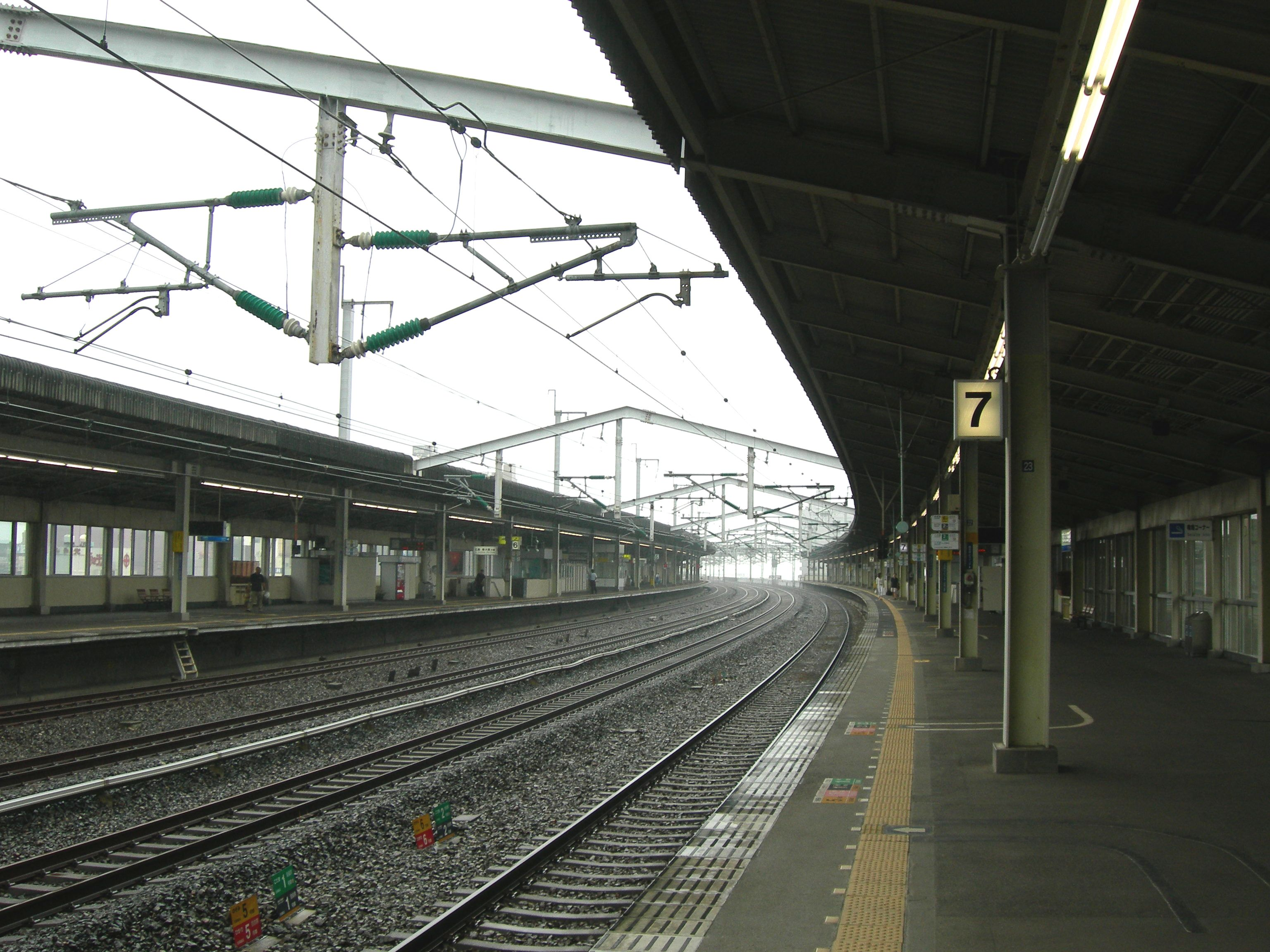 徳山駅新幹線ホーム